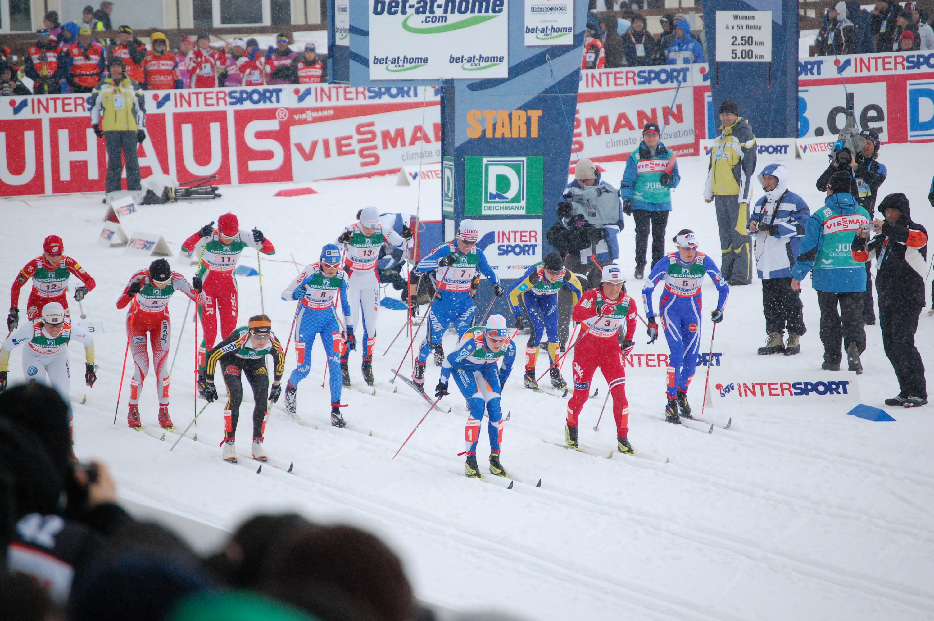 MS 2009 Liberec. Start ženské štafety 4x5km